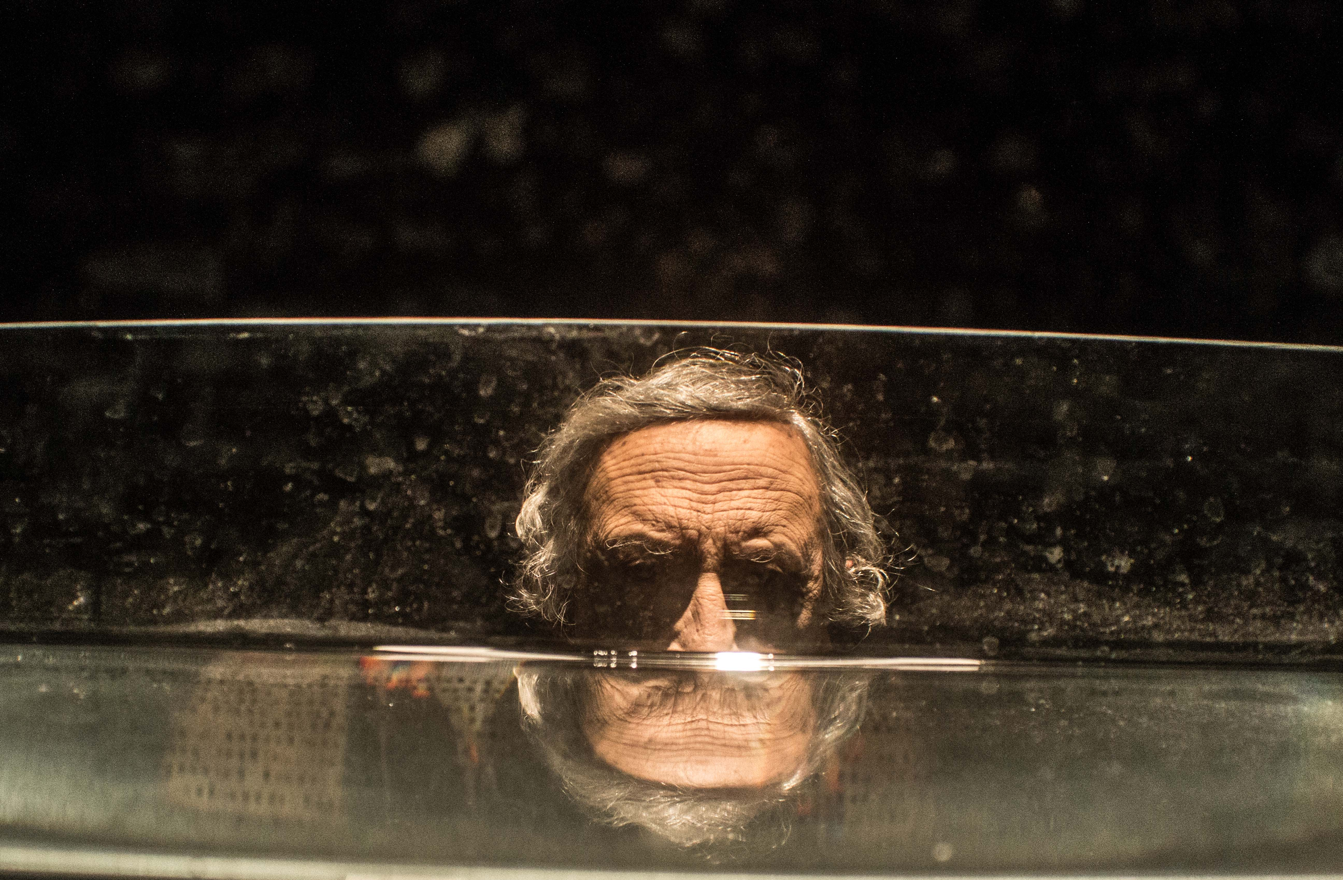 Pippo Di Marca, Theatrum Mundi Show, Teatro India 2018, foto di Salvatore Insana